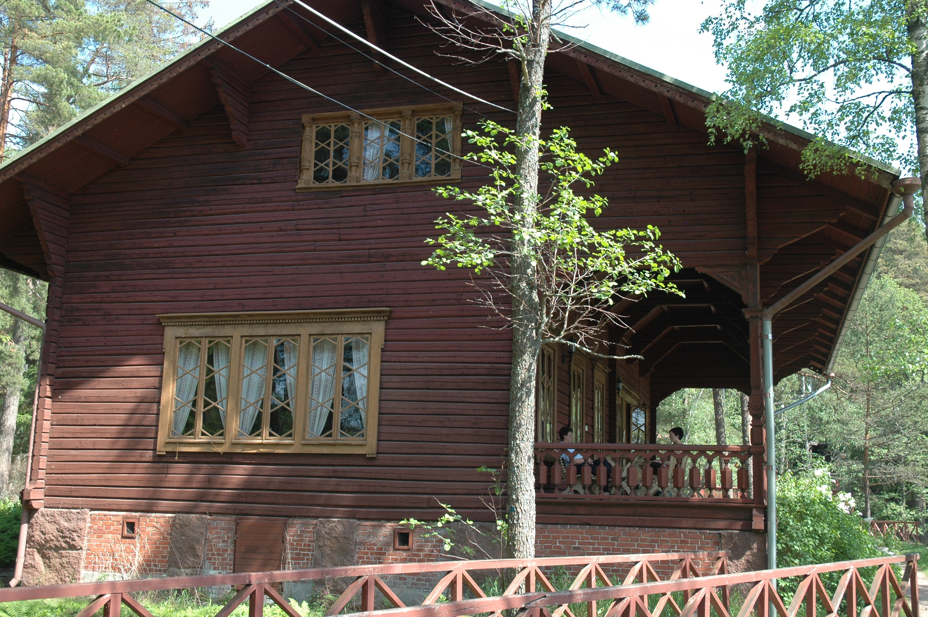 Langinkoski Imperial Fishing Lodge.